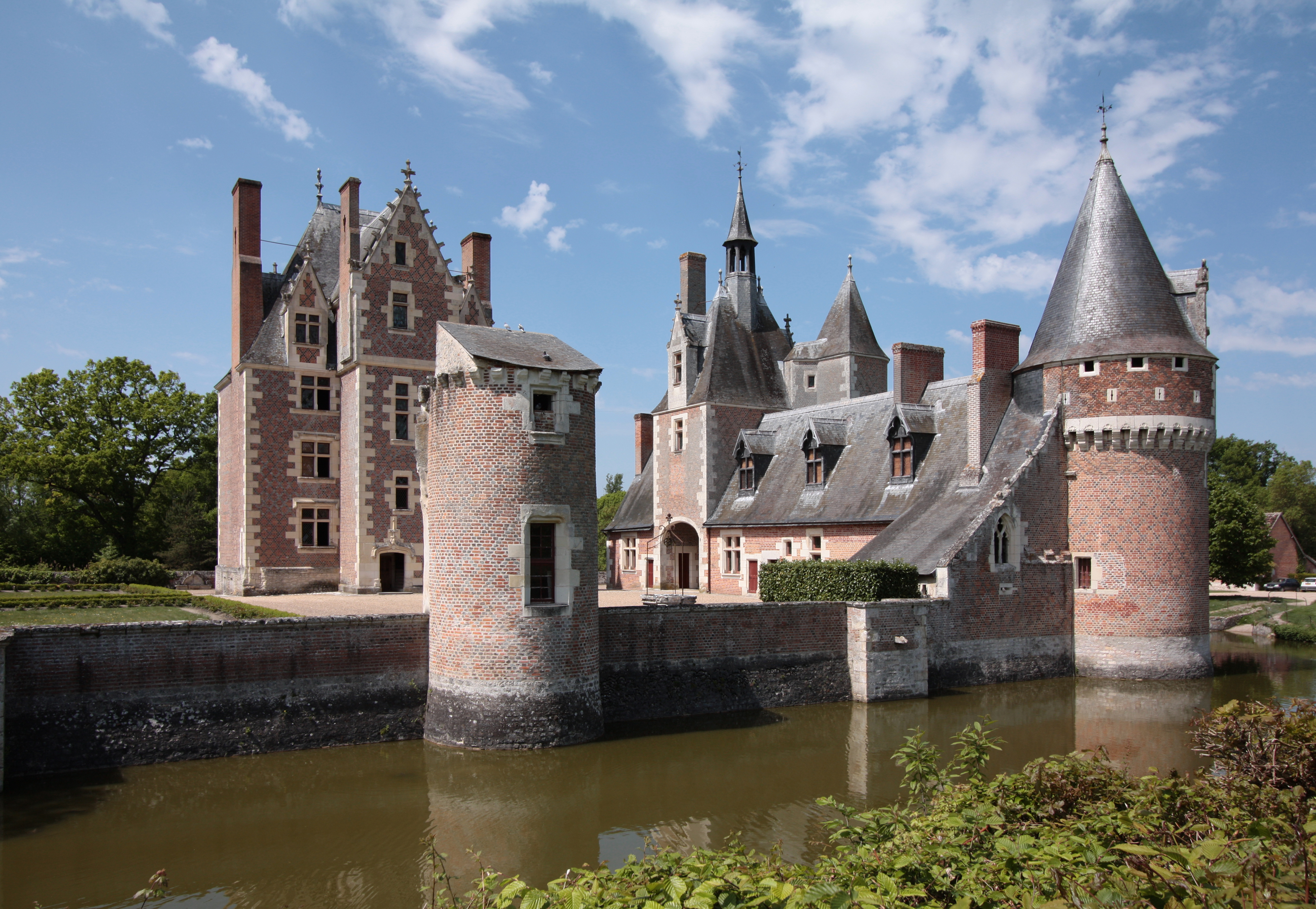 Schloss Le Moulin in der Kommune Lassay-sur-Croisne im Departement Loir-et-Cher/Frankreich - Die Schlossanlage von Südosten.